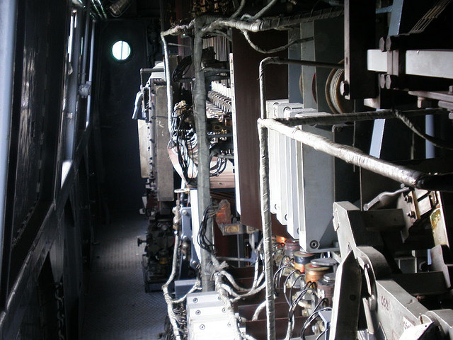 2007.06.17 - 123 Gdynia Główna, ET22-681 engine room